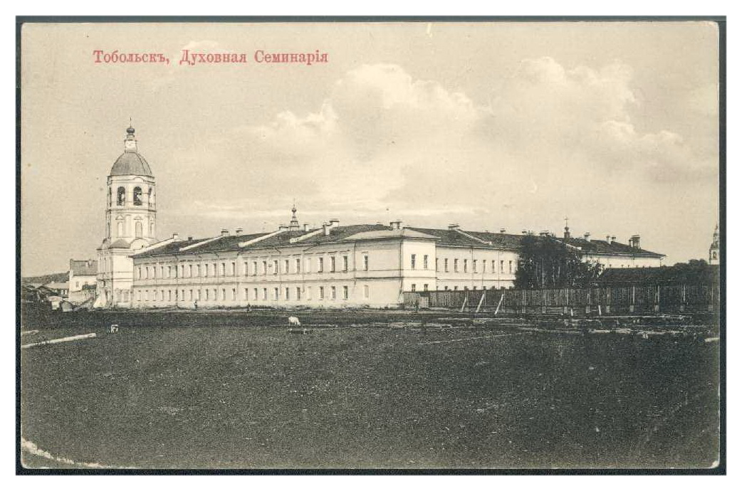 Тобольская духовная семинария до октябрьского переворота